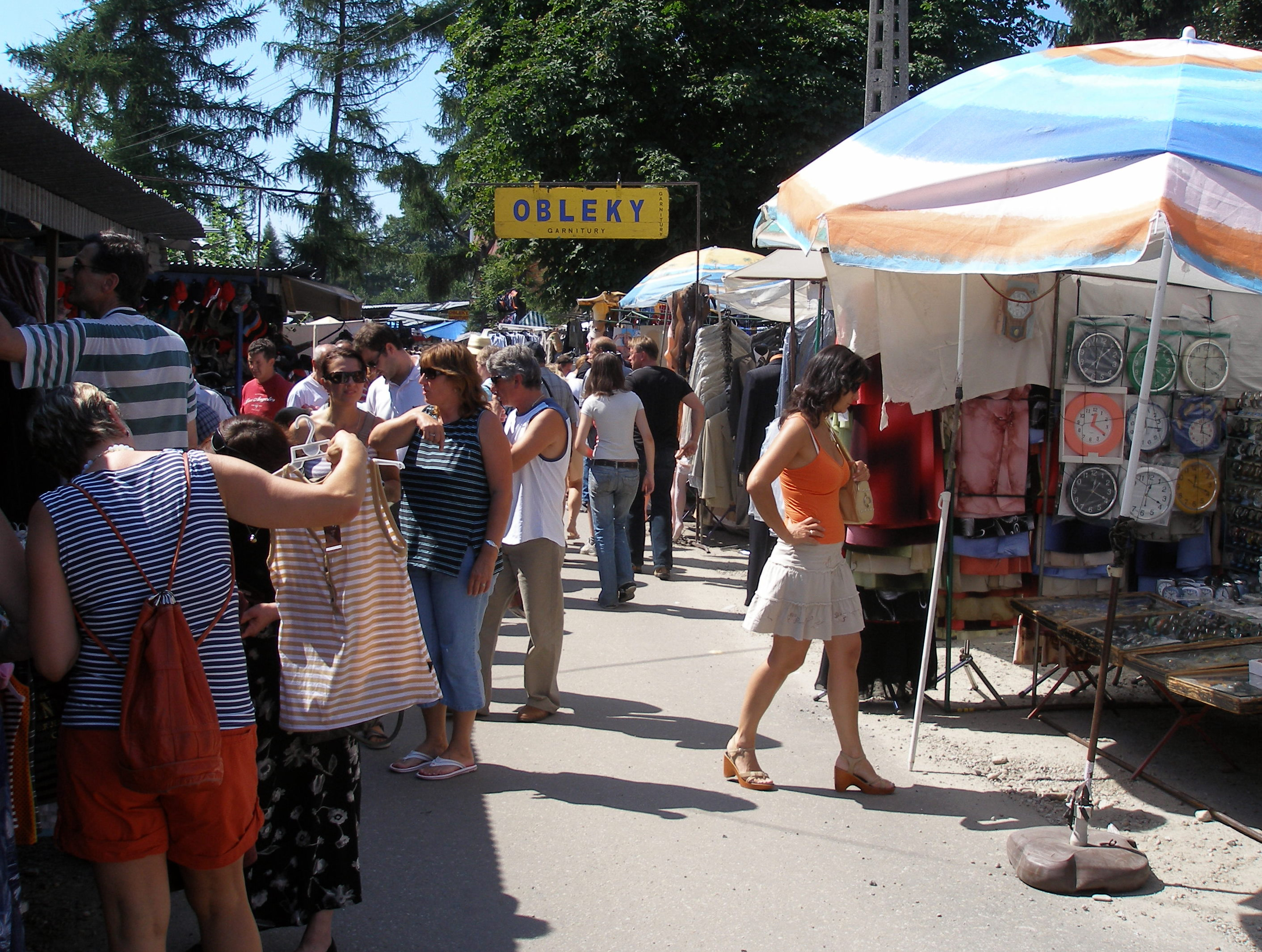 Slovákmi obľúbené trhovisko v juhopoľskom meste Nowy Targ.